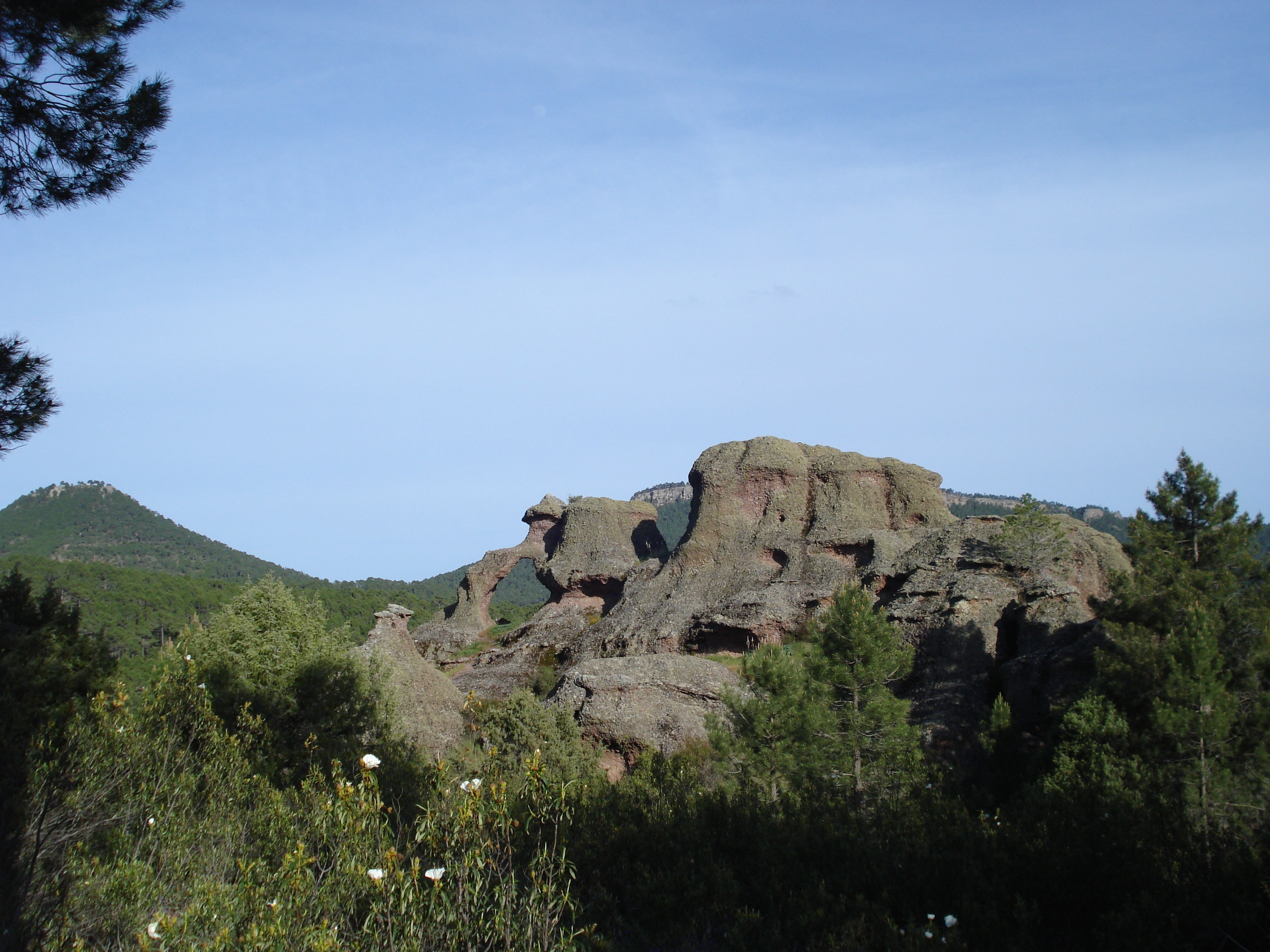 LA OBRADA